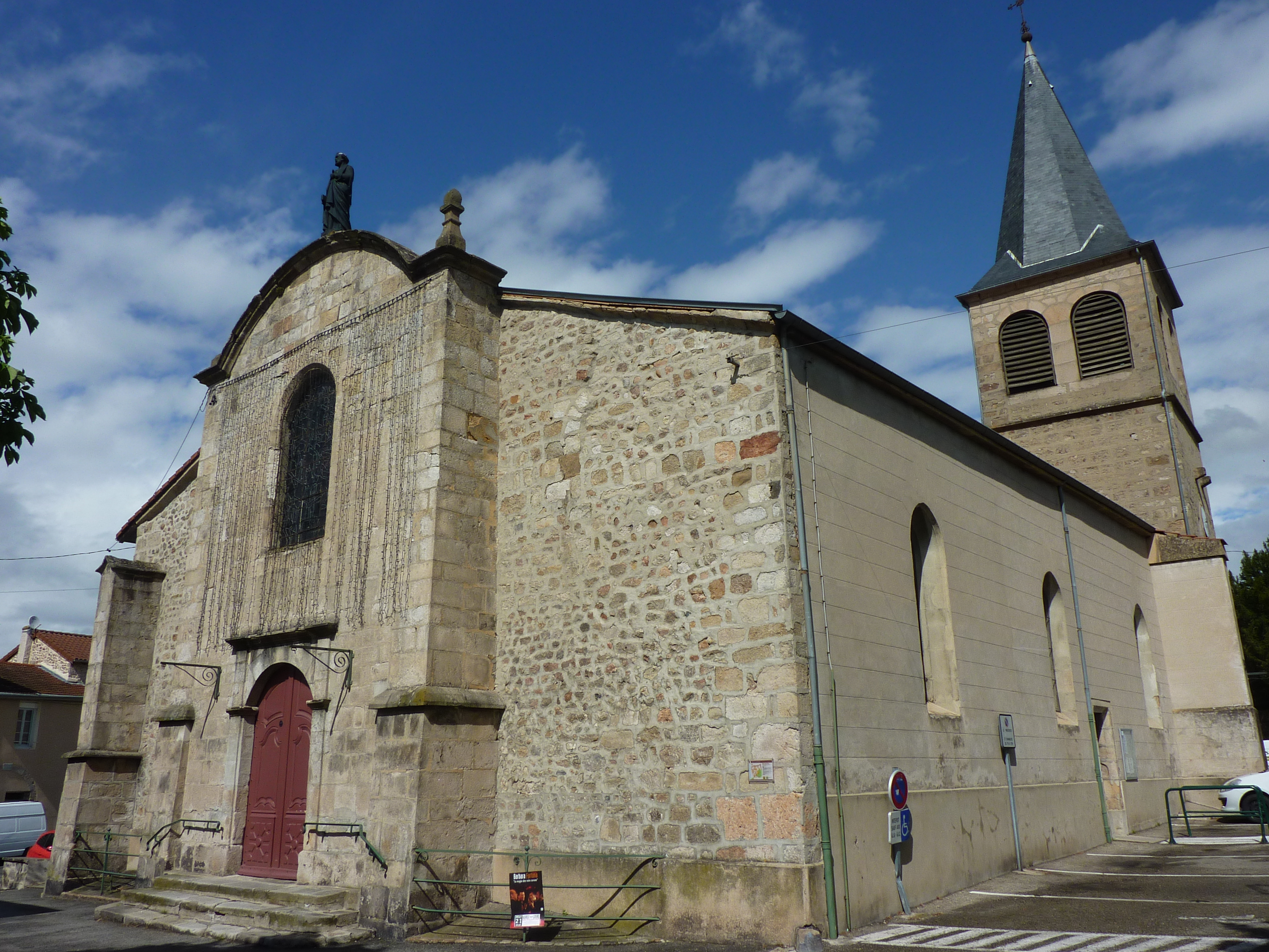 Eglise Saint-Pierre d'Aurec.